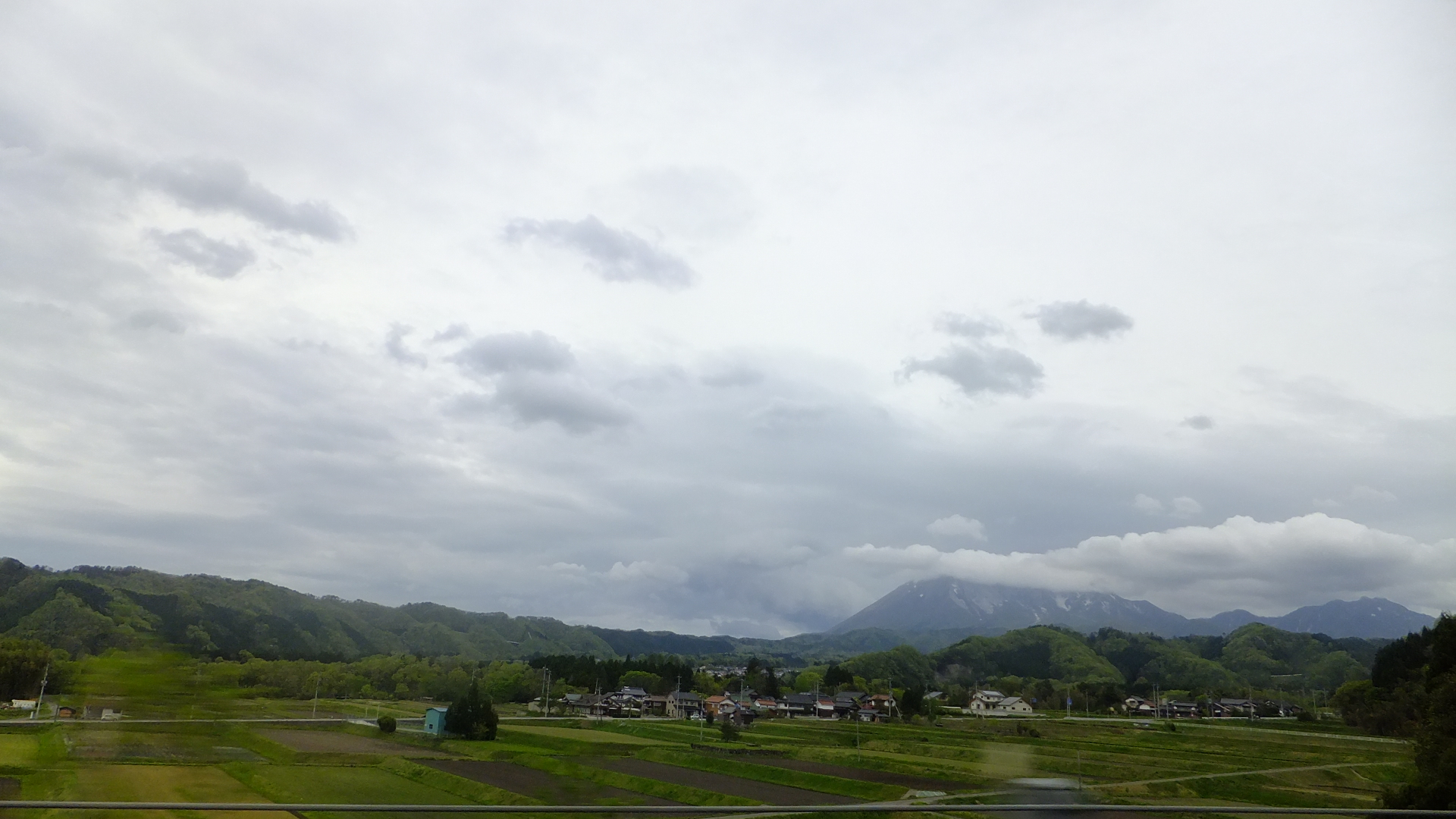 鳥取県日野郡江府町江尾